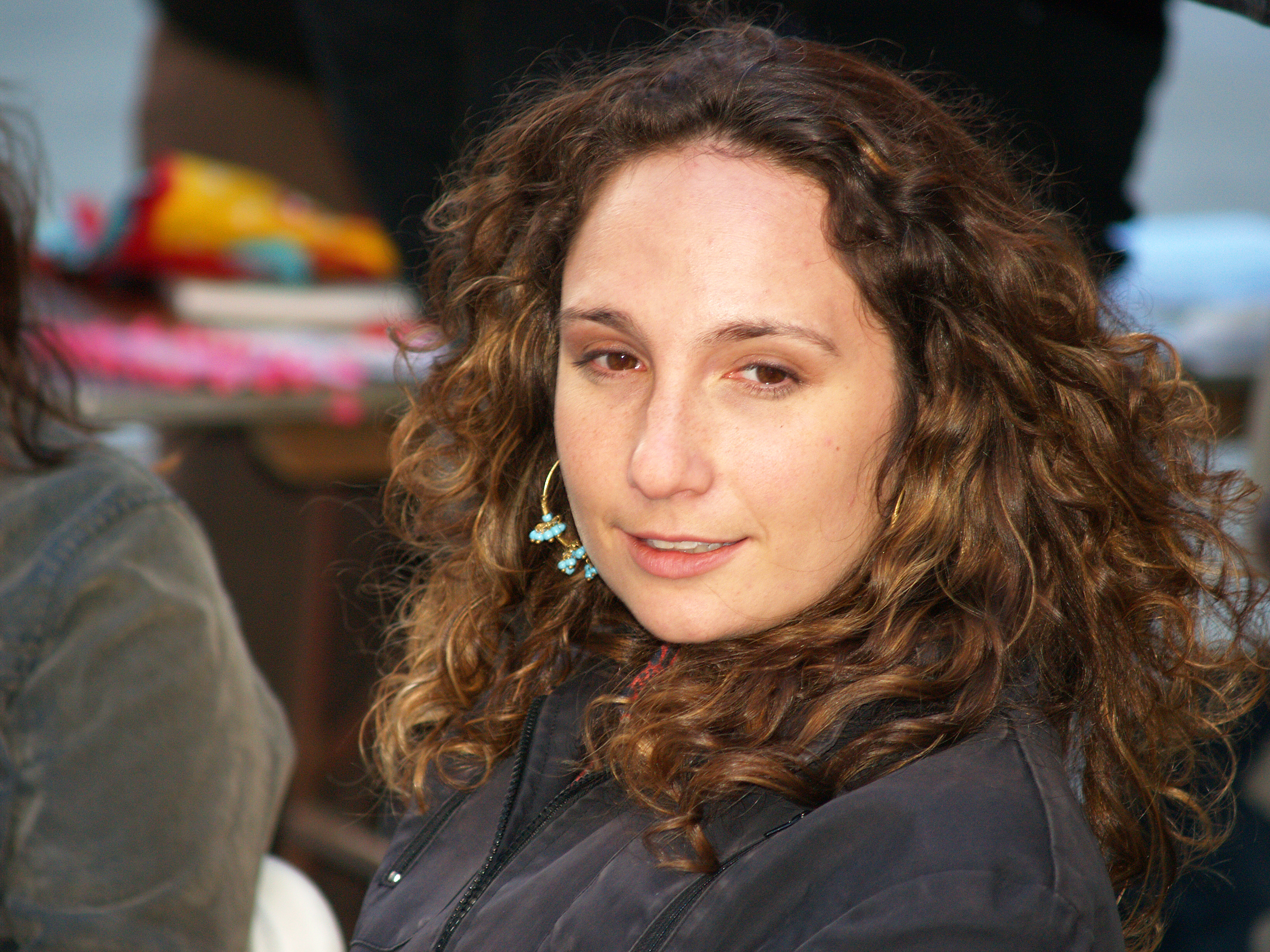 Lauren Weinstein